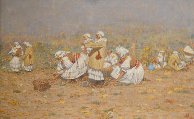 Бабье лето